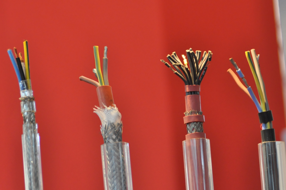 Hannover-Messe April 2012 Dieses Foto entstand durch die Mithilfe des gemeinnützigen Vereins Skillshare bei der Akkreditierung als Fotograf. Infos unter skillshare.eu Skillshare e.V. ist ein eingetragener gemeinnütziger Verein zur Förderung der Bildung durch Unterstützung der Erstellung, Sammlung und Verbreitung so genannten freien Wissens. IBAN: DE16 8306 5408 0004 8850 66 BIC: GENODEF1SLR Bank: VR-Bank Altenburger Land